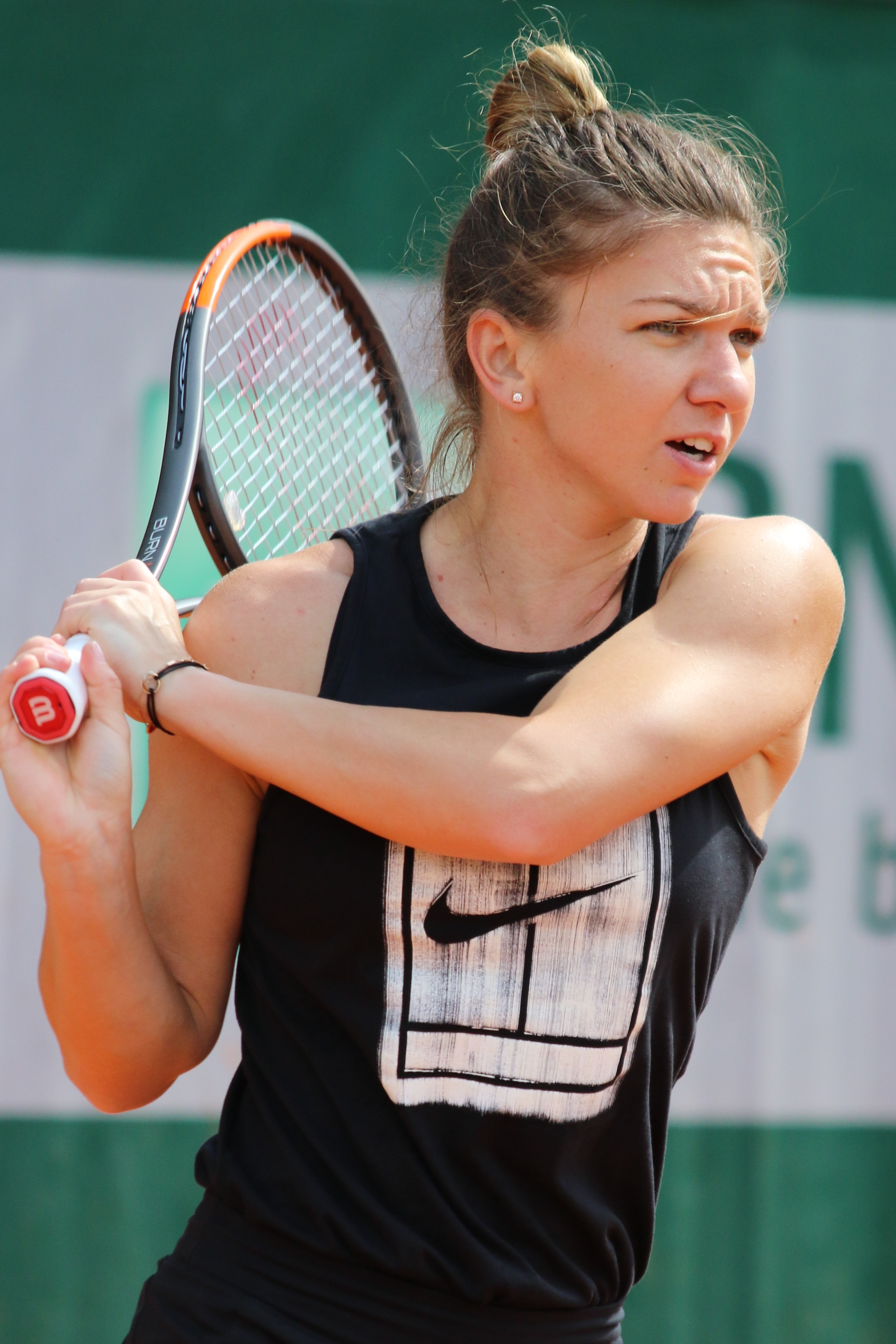 Halep RG18 (25)